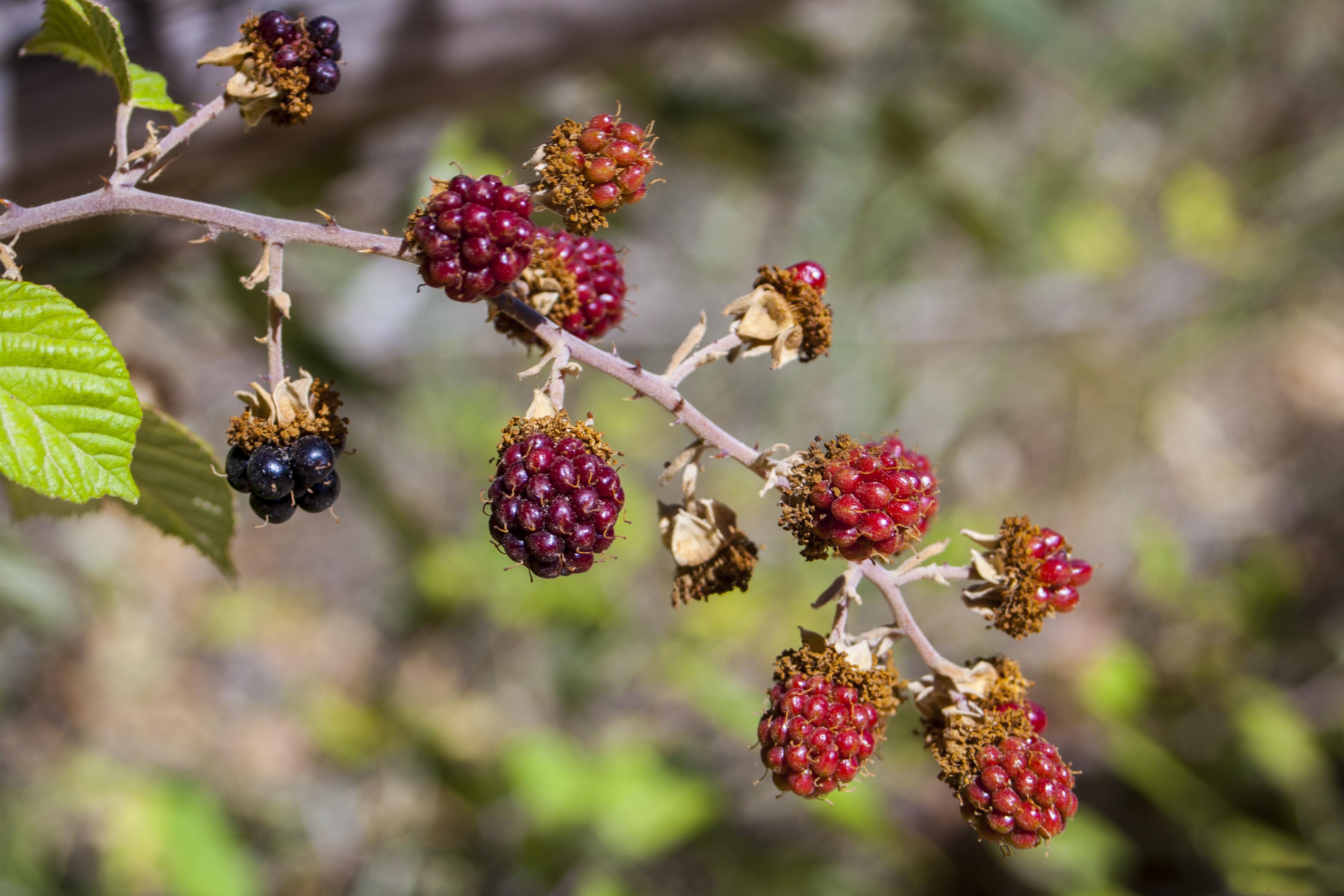 Moras silvestres del Rio Júcar de Albacete